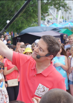 Бердянск